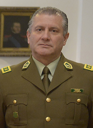 Bruno Villalobos Krumm, director general de Carabineros de Chile desde 2015.